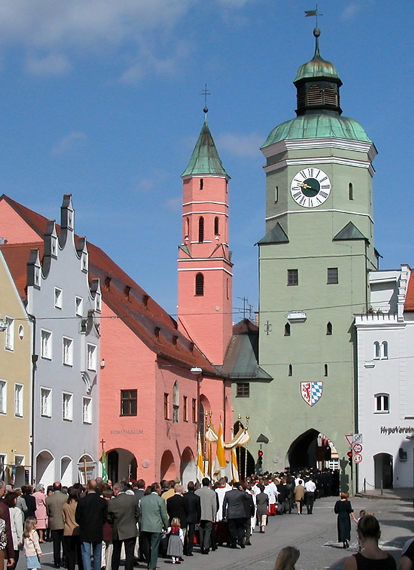 Das Heimatmuseum Vilsbiburg ist in den Gebäuden unmittelbar am historischen Torturm untergebracht.